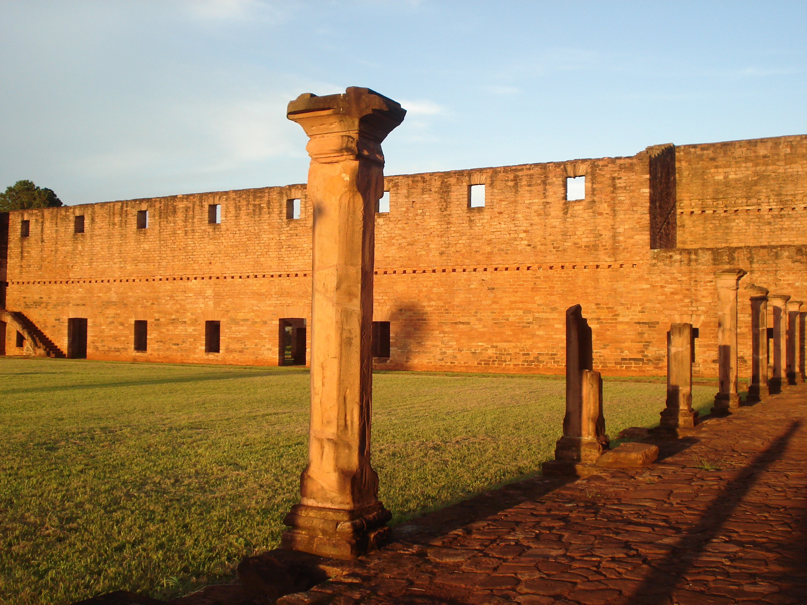 Ruinas jesuiticas. Paraguay